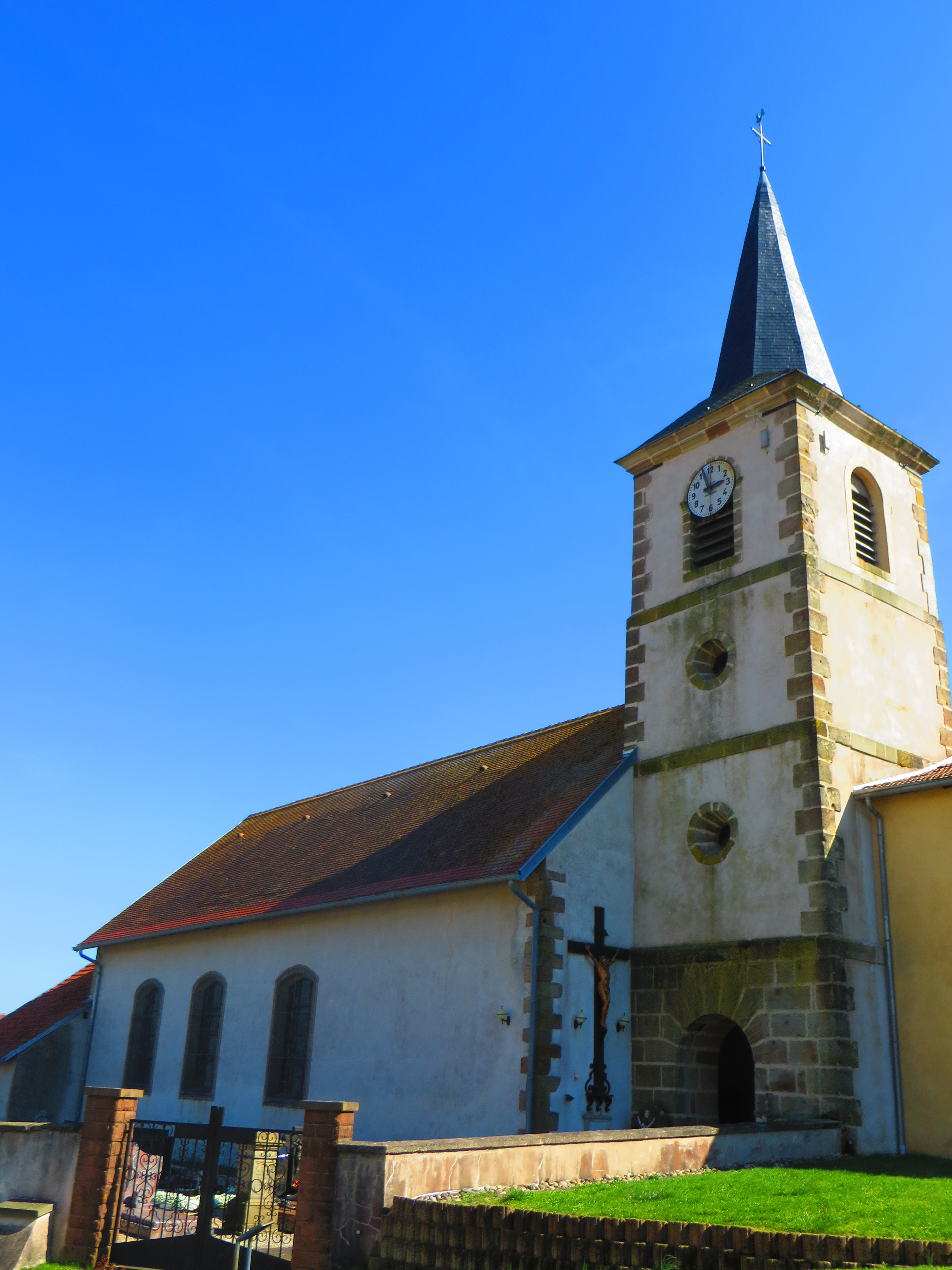 Boustroff Église Saint-Hubert